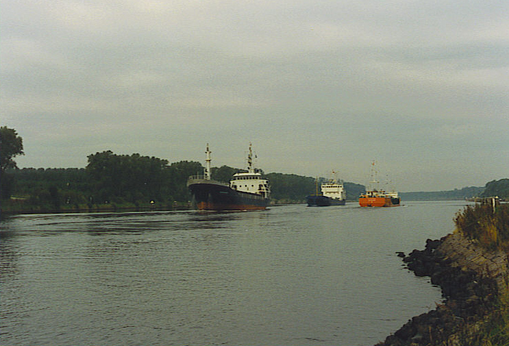 Propre Photo